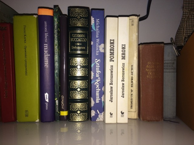 Książki na półce, wśród nich Pomroki i Mroki Jarosława Borszewicza